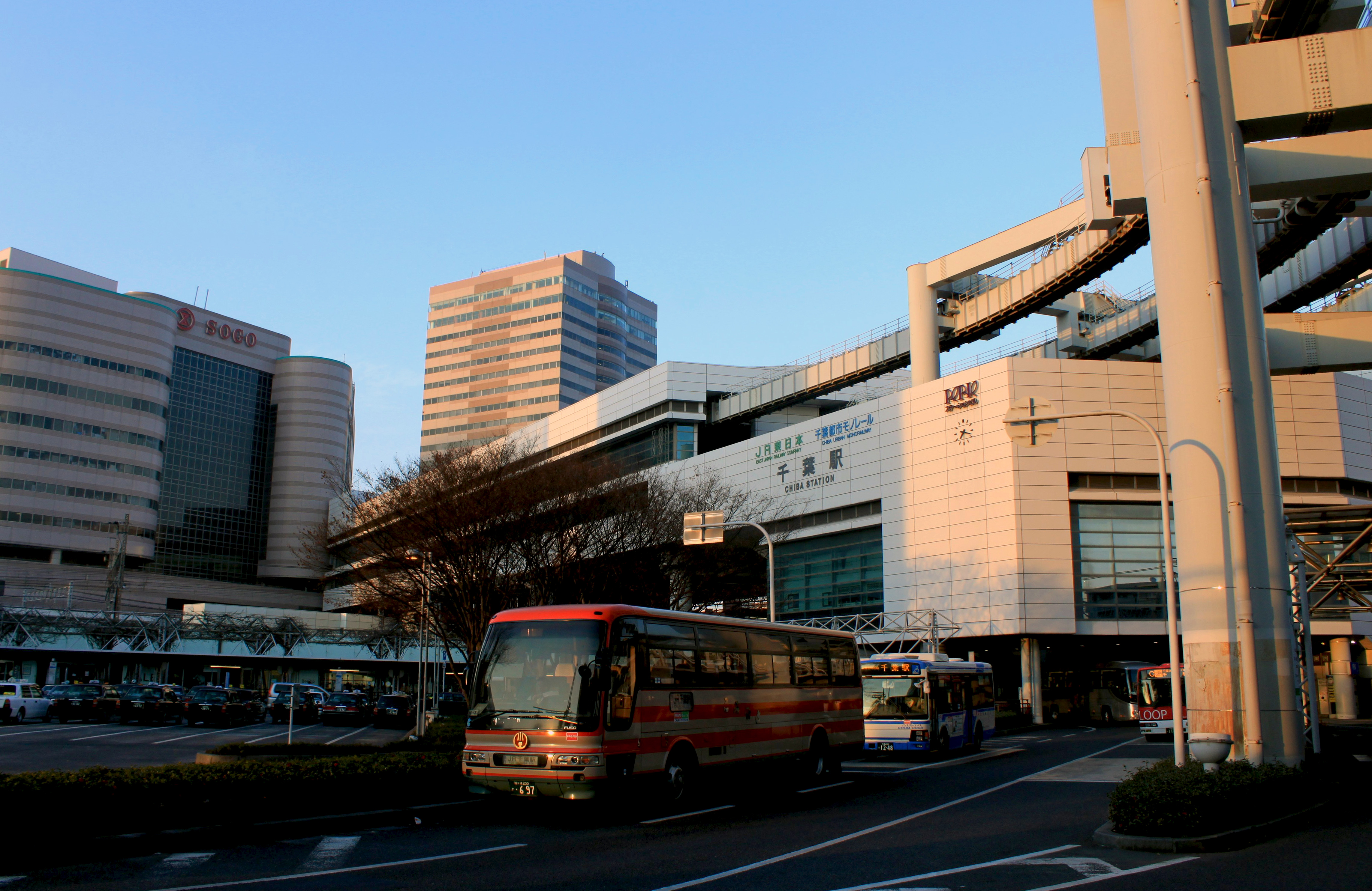 千葉駅